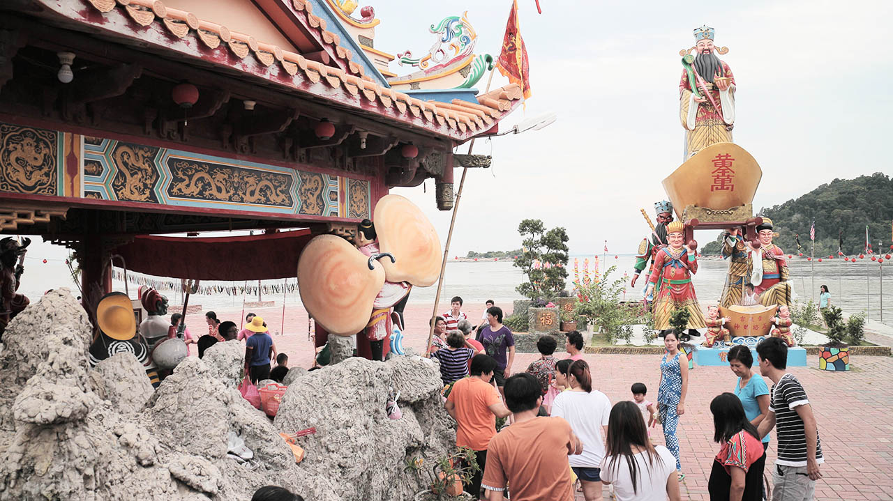 峇株巴辖石文丁崇龍宮一景